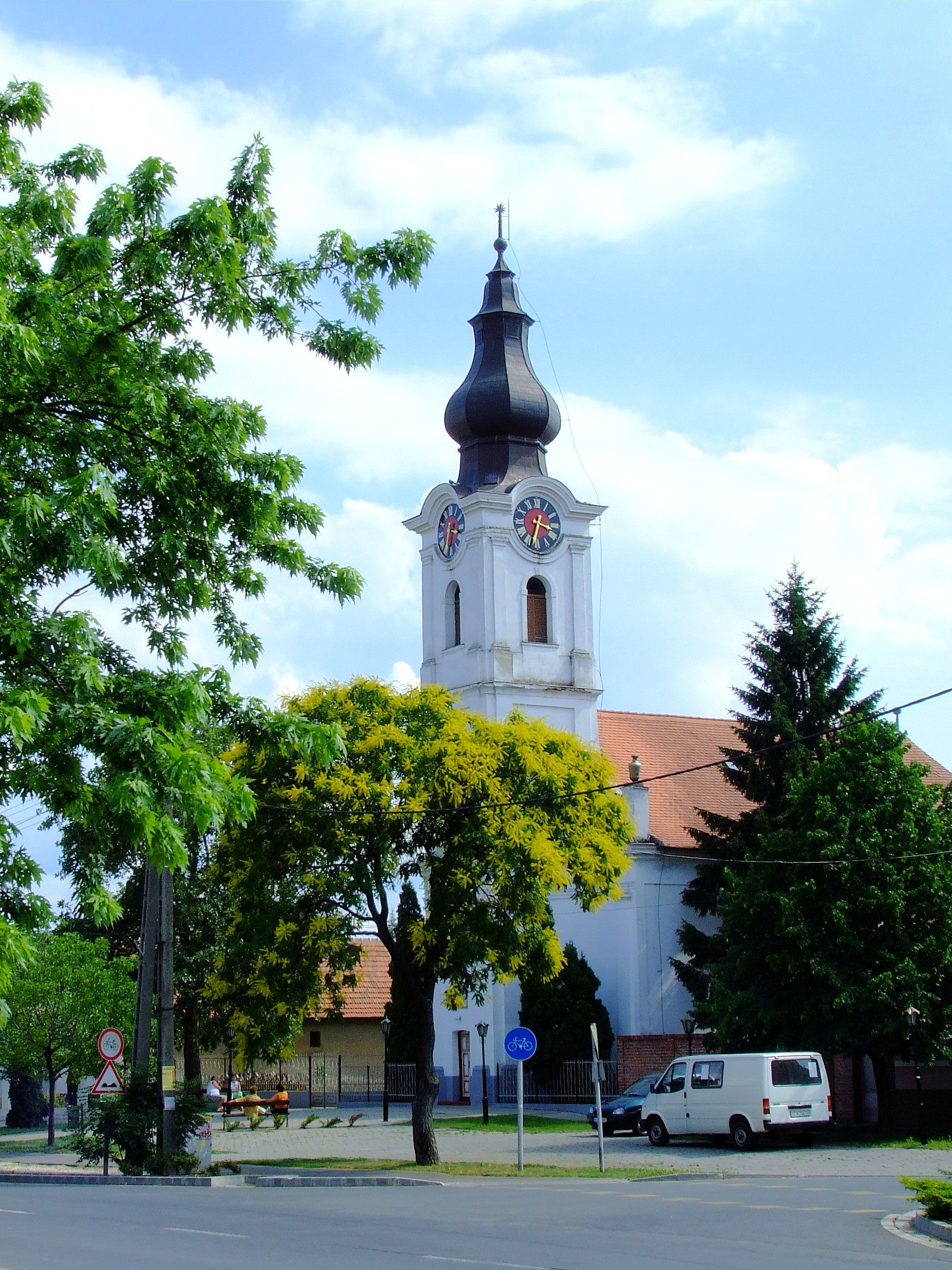 A soltvadkerti református templom. A műemlék templom 1794-ben épült, 1993-96 között felújították fel